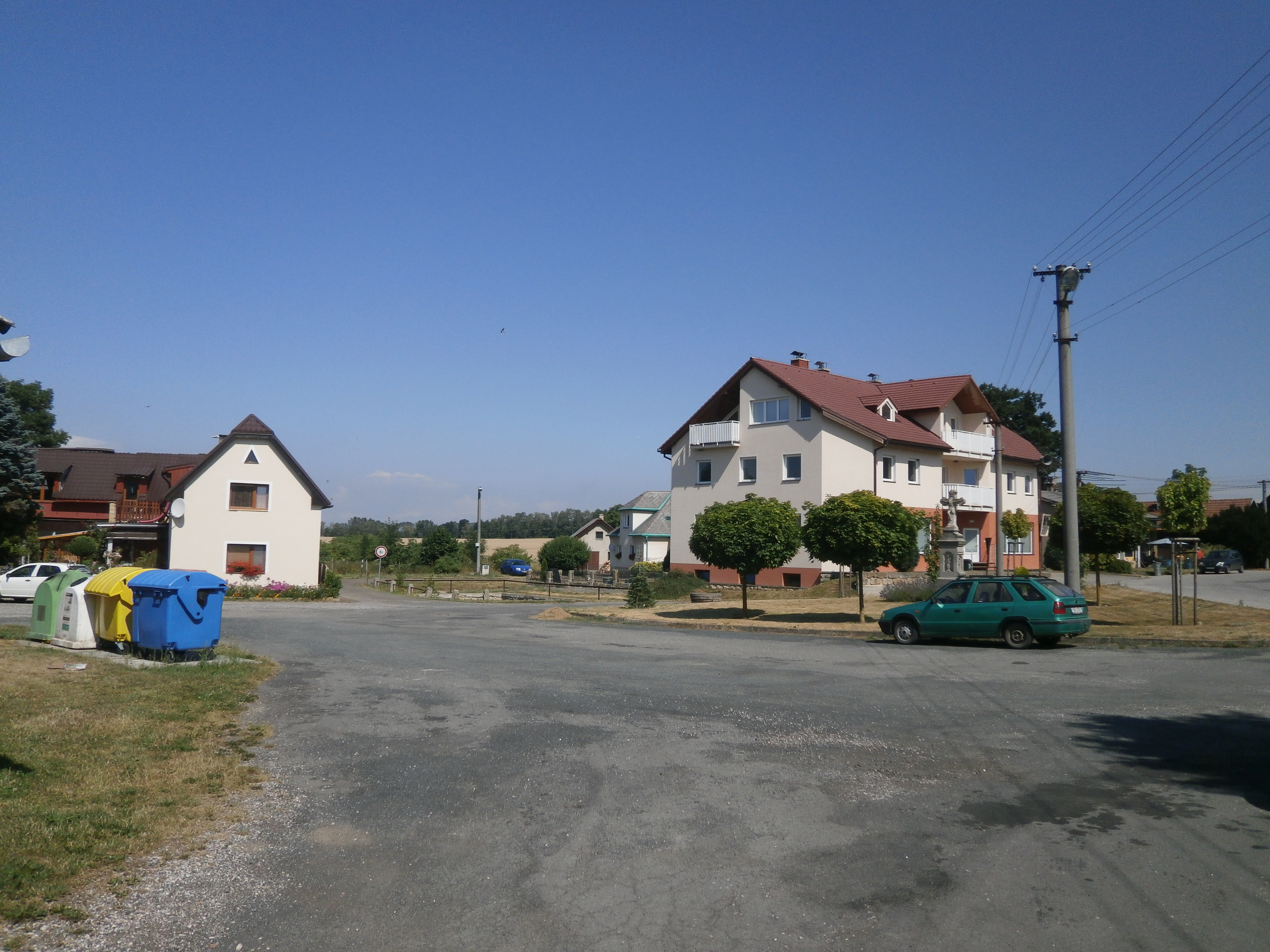 Obruby - náves